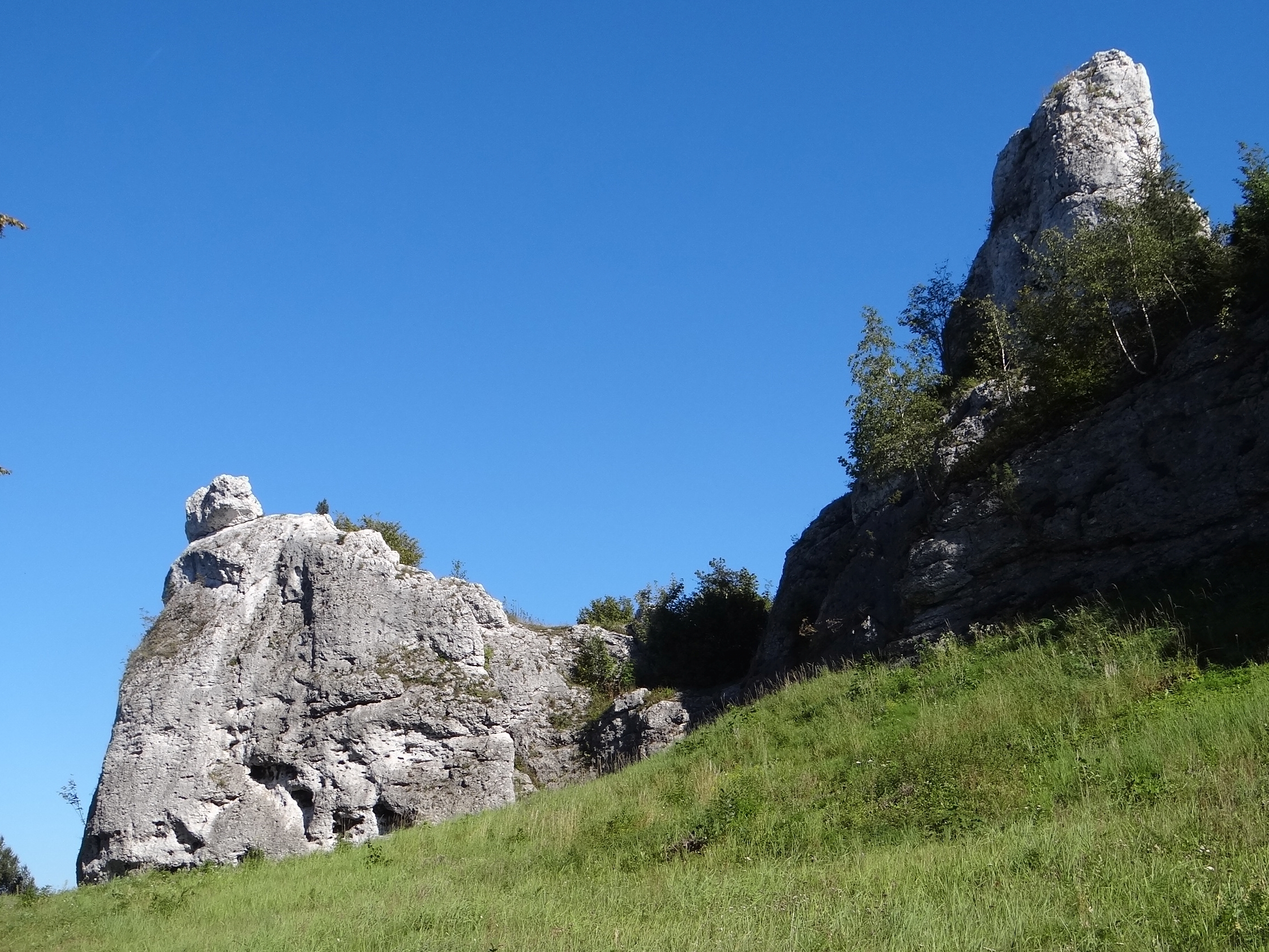 Skały Adept i Garnek na Podzamczu